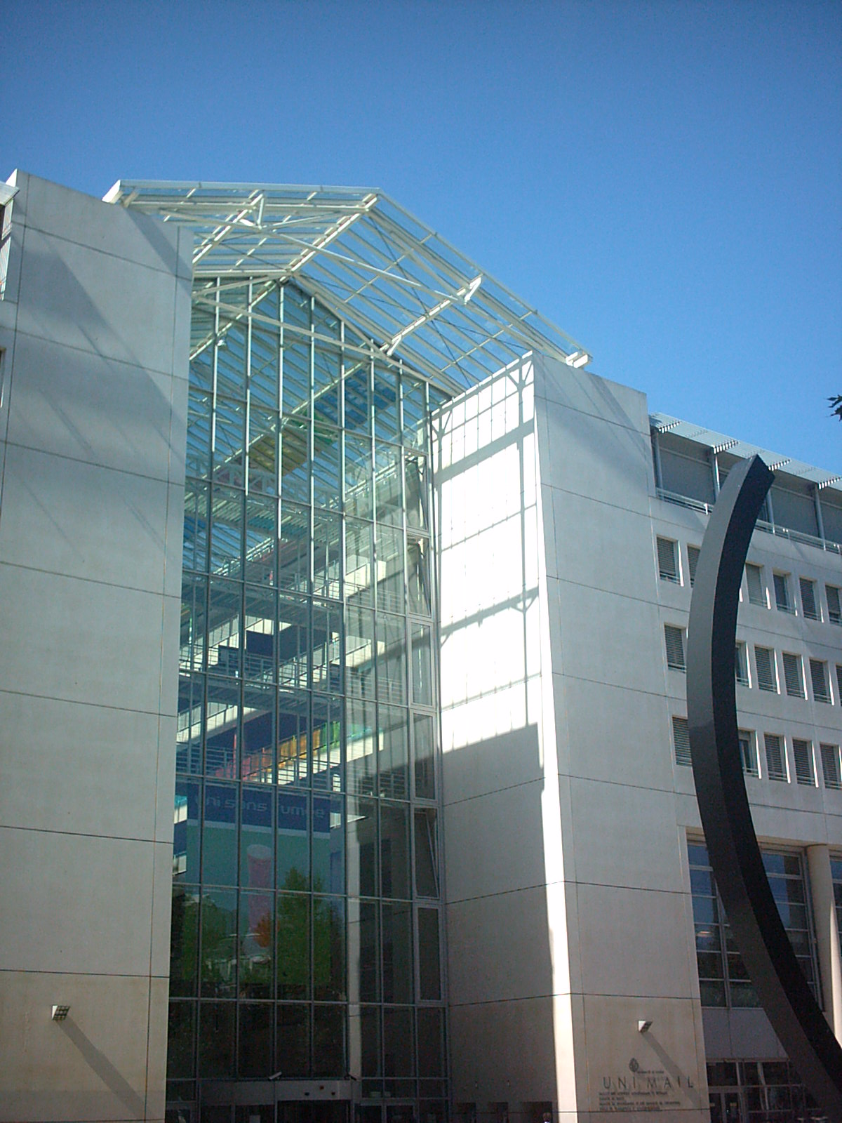 Université de Genève (Suisse) : bâtiment Uni-Mail